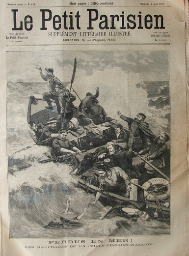 Saint Nazaire